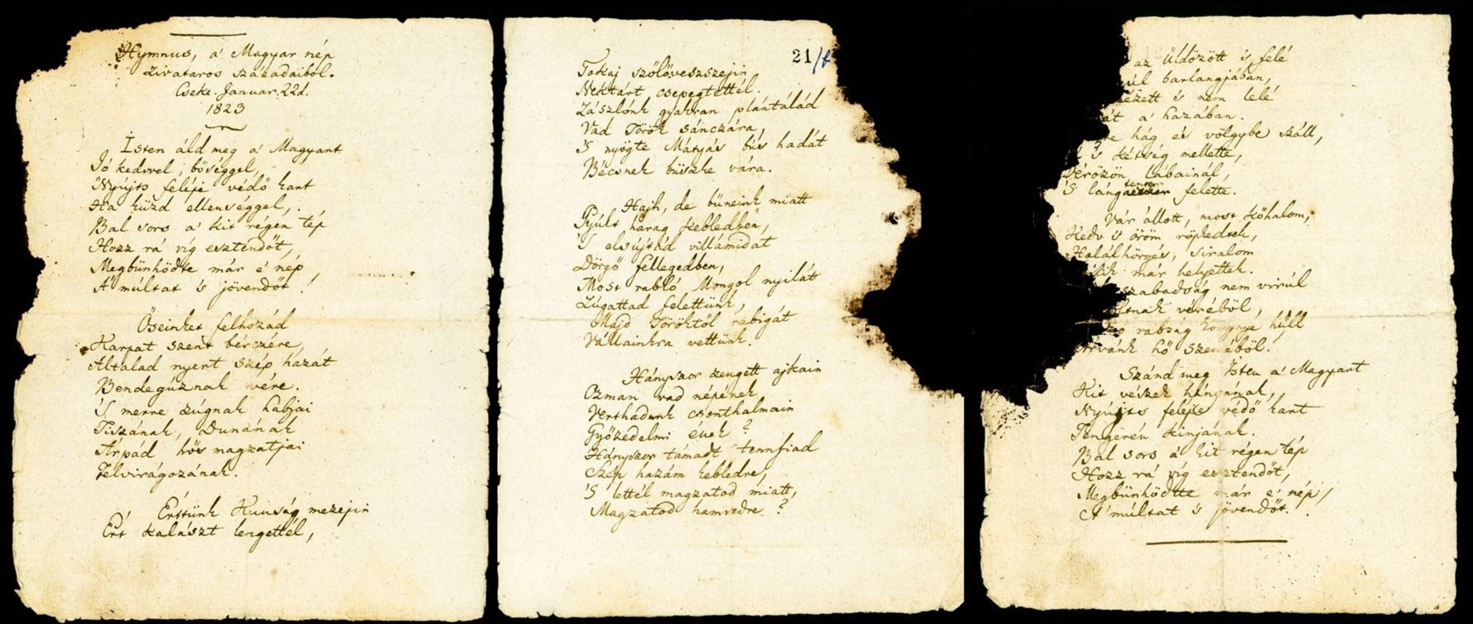 A magyar himnusz (Hymnus, a' Magyar nép zivataros századaiból) kézirata A szöveg a Magyarország himnusza cikkben olvasható.